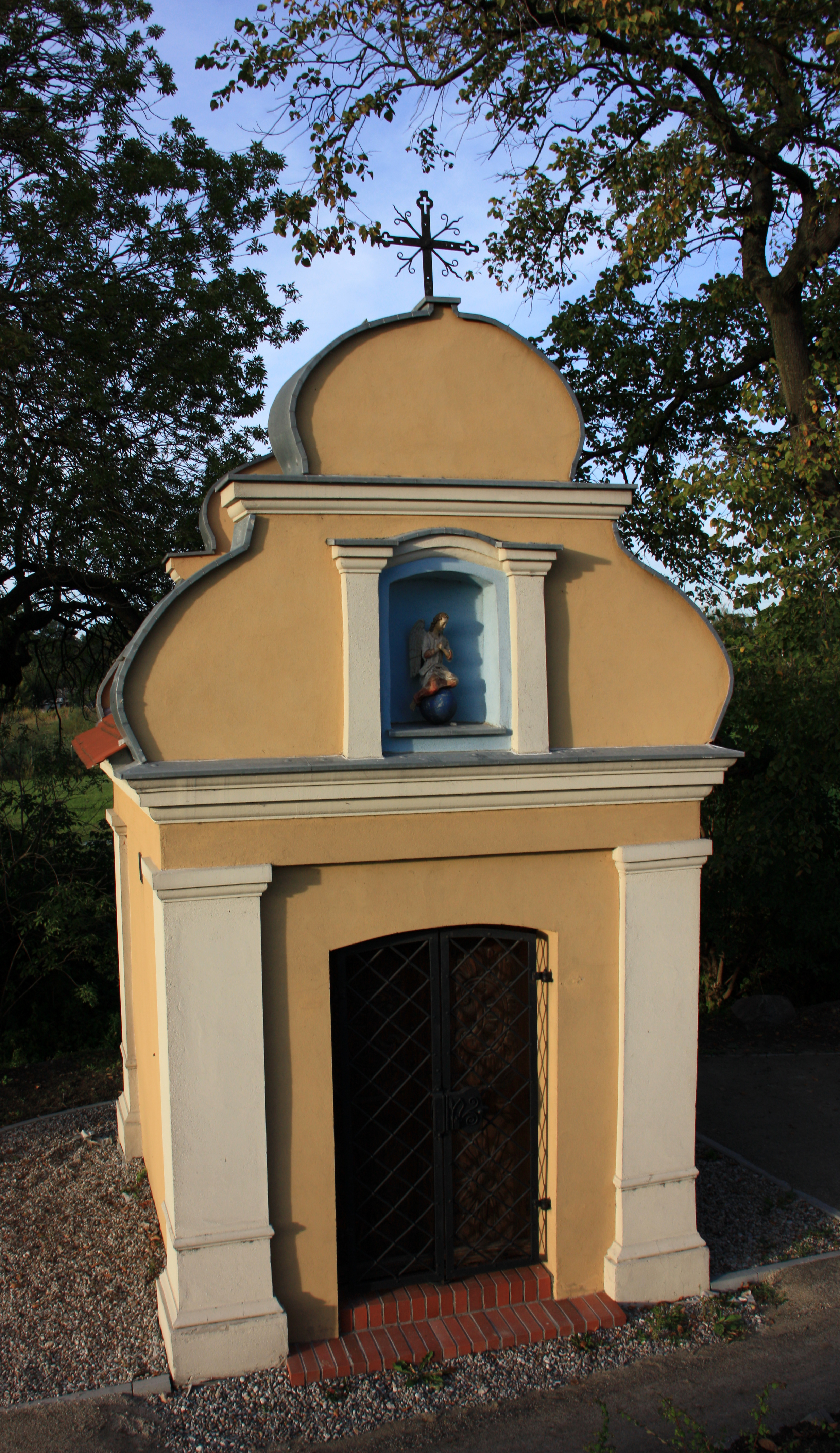 zespół kalwarii, XVII-XIX w.: 25 kaplic; tzw. klasztorek (plebania) Pakość Kapliczka - Potok Cedron